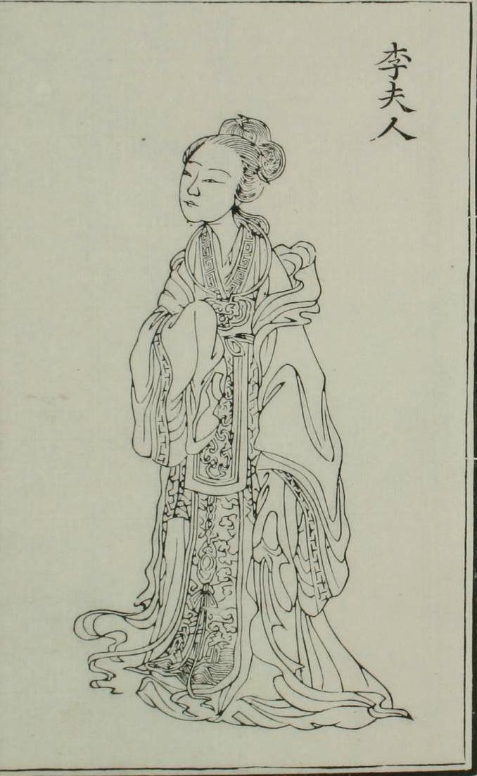 关于李夫人的图像。